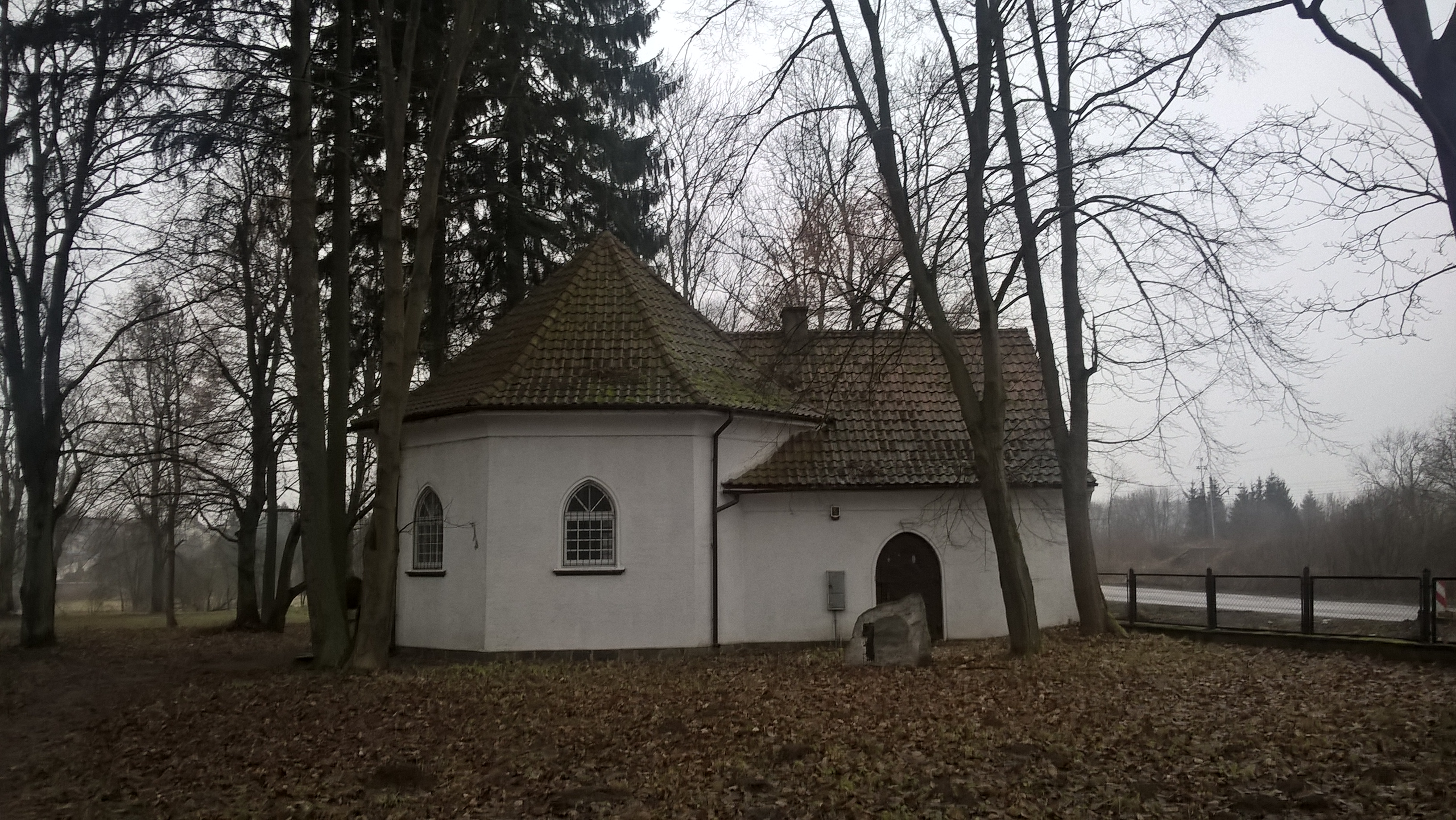 Cerkiew św. Włodzimierza w Morągu, dawna kaplica ewangelicka